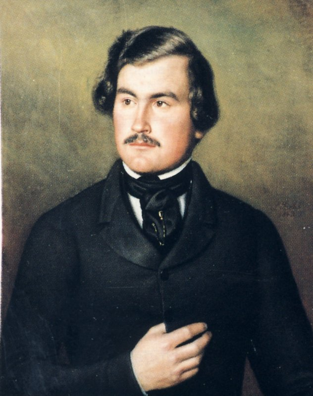 Porträt Wilhelm Sachs, Tabakfabrikant aus Mannheim und späterer Außenminister der provisorischen Badischen Revolutionsregierung von 1849. Öl auf Leinwand, 63 x 53 cm. Signiert L.Sachs 1843